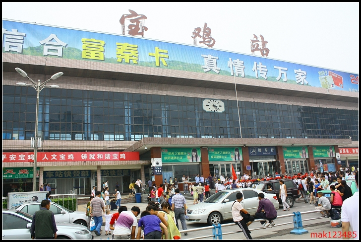 宝鸡火车站